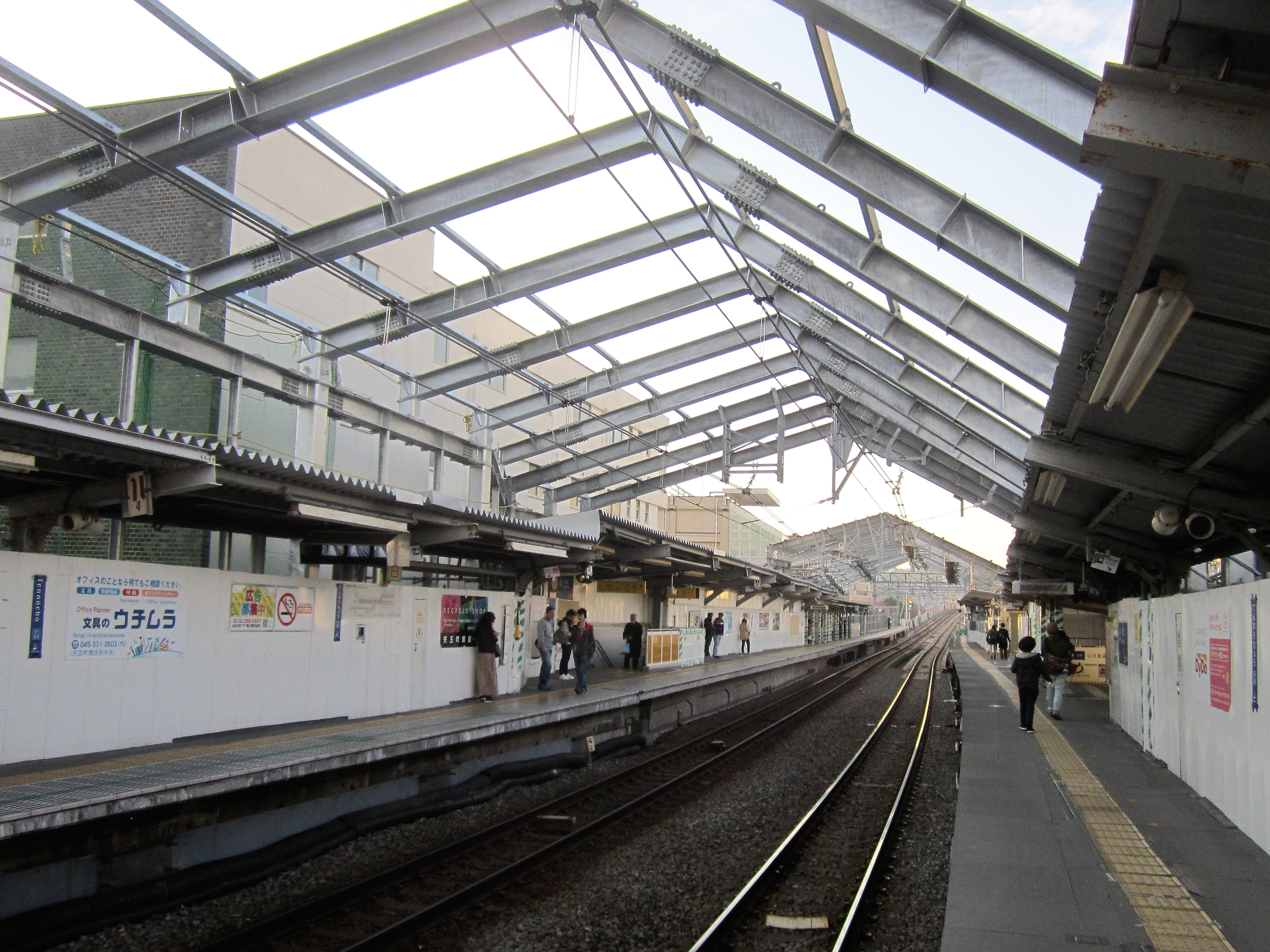 天王町駅ホーム